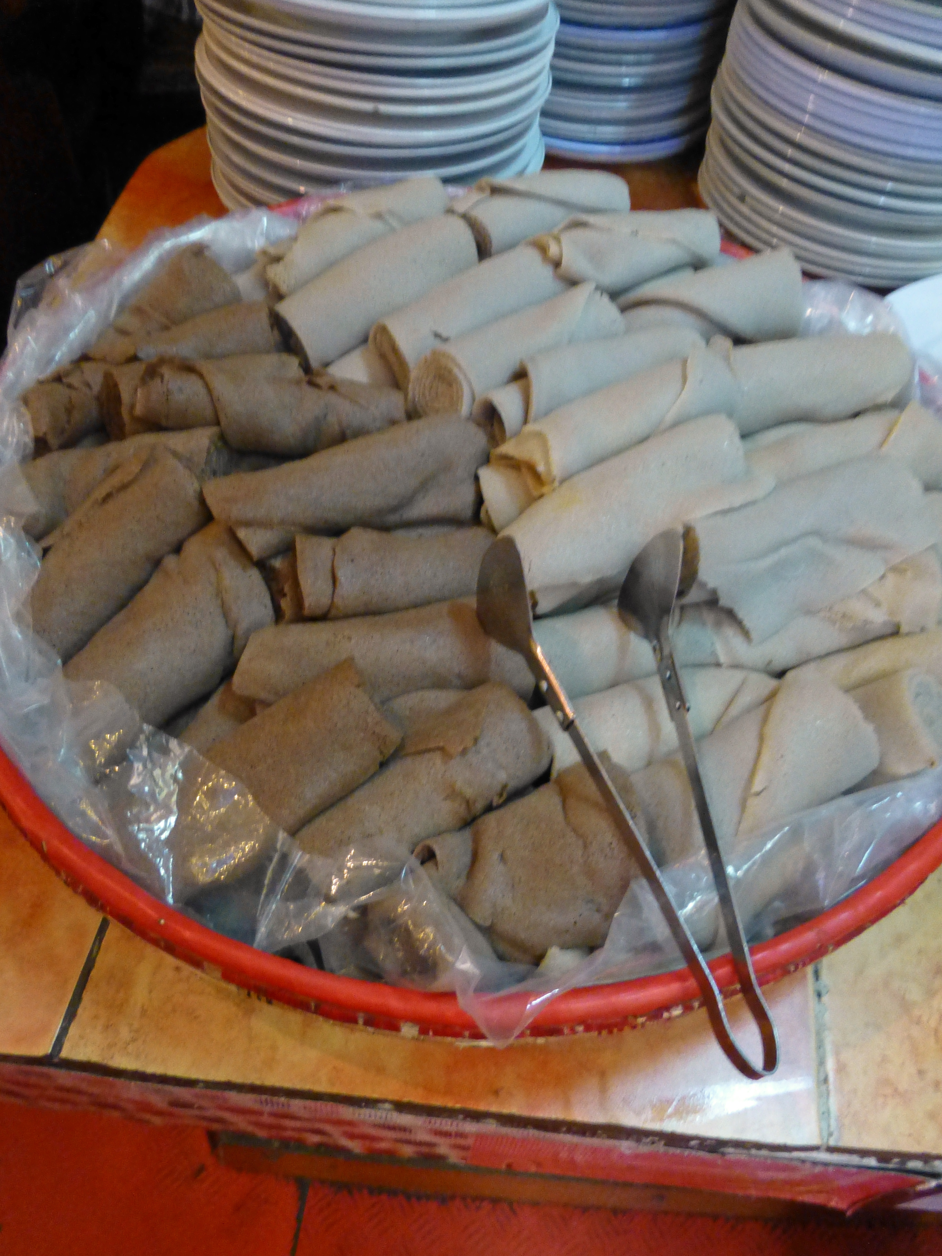 Rouleaux d'injera (Addis-Abeba, Ethiopie)